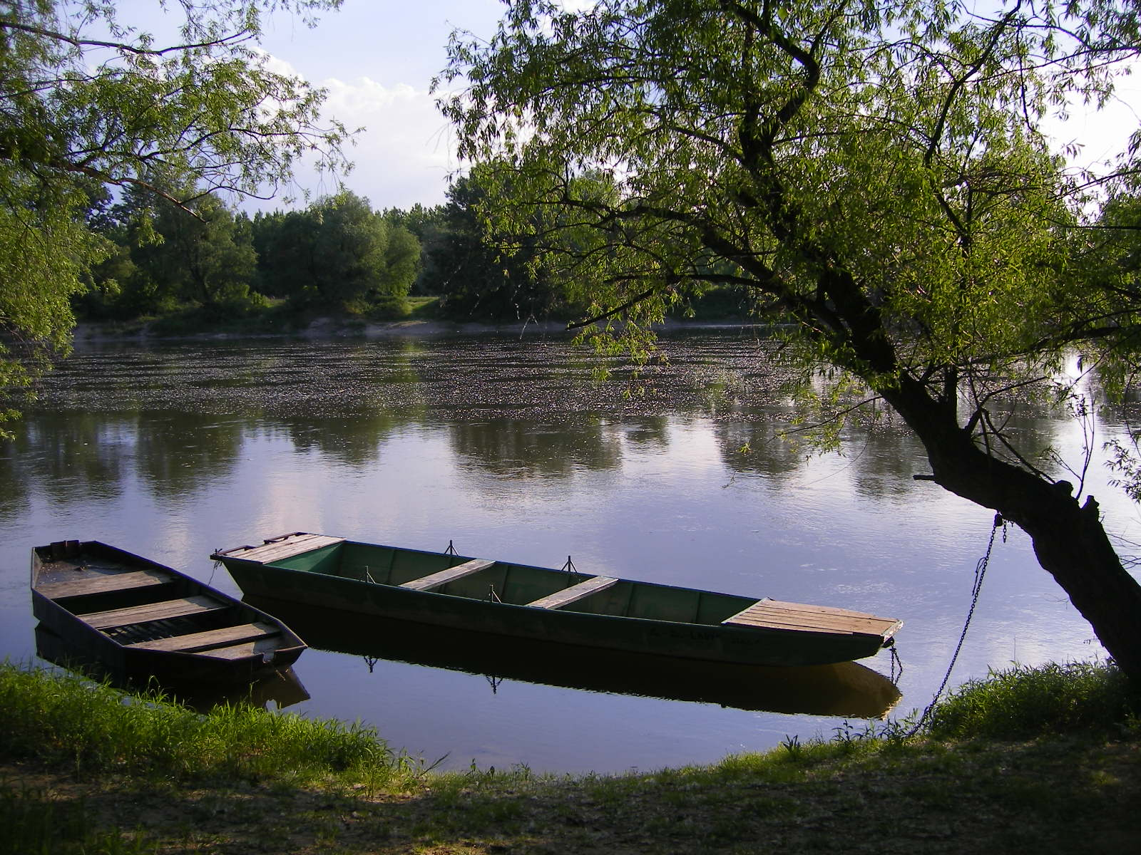 Szímő - Vág-part